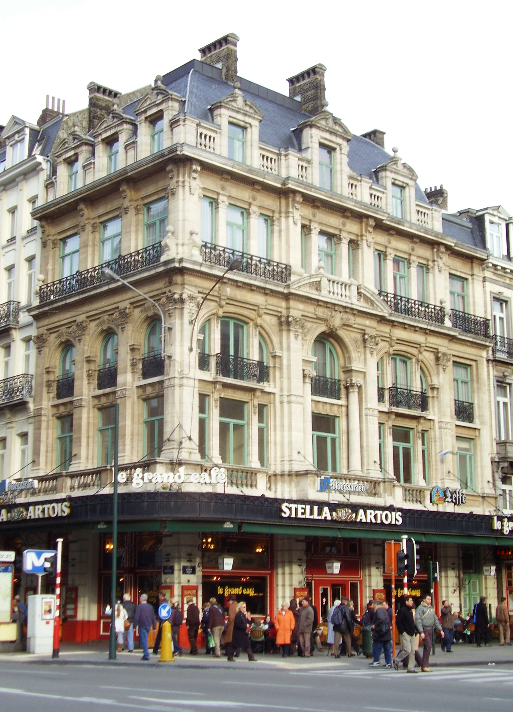 Maison de commerce, au coin du Boulevard Anspach et de la rue de la Bourse - Bruxelles - architecte Émile Janlet, 2ème prix du concours d'architecture de 1876